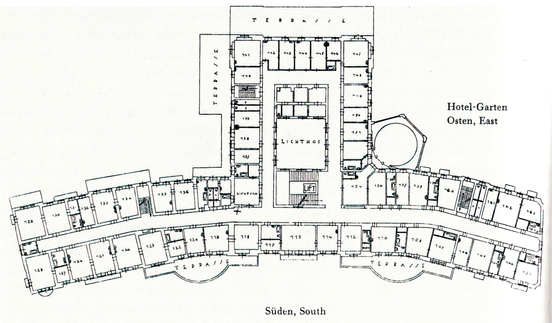 Hotel de l'Europe, auch Grand Hotel de l'Europe, Hotel Europäischer Hof, in Salzburg; Grundriss des 1. Stocks; vermutlich aus einer hoteleigenen Broschüre; gescannt aus: Andreas Kapeller: Hôtel de l'Europe. Salzburgs unvergessenes Grandhotel. Stadtverein Salzburg/Colorama Verlag 1997 (ohne ISBN), S. 60.